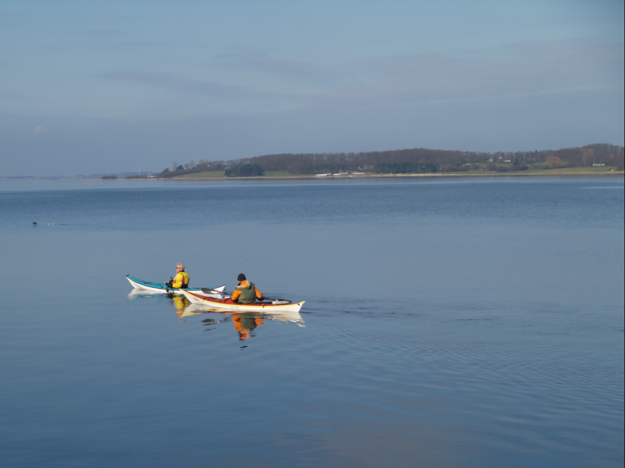 Fiorde de Roskilde. Roskilde fjord.